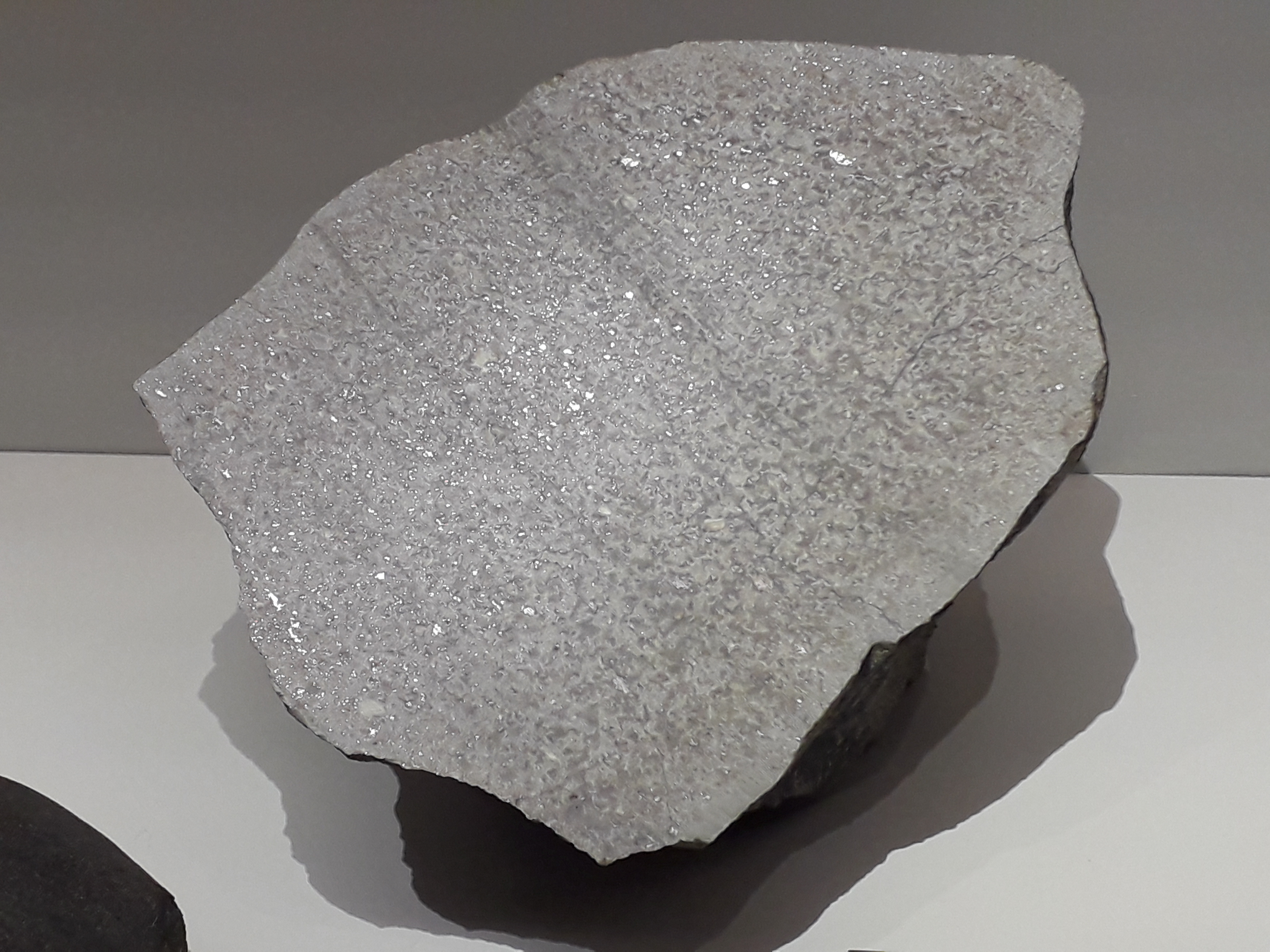 Météorite "Kernouvé", tombée en France en 1869. Chondrite ordinaire (H6). La météorite tombe le 22 mai 1869 en illuminant le ciel. Des habitants du Morbihan, pensant avoir trouvé un morceau de lune, auraient emporté chacun un morceau de la météorite comme porte-bonheur après l'avoir cassée à coups de masse. Exposée à Paris à l'occasion de l'exposition "Météorites", dans le bâtiment de la grande galerie de l'évolution, au Muséum national d'histoire naturelle de Paris (18 octobre 2017 - 10 juin 2018).